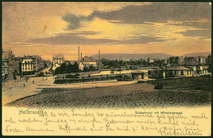 Heilbronn,_Südbahnhof_um_1906